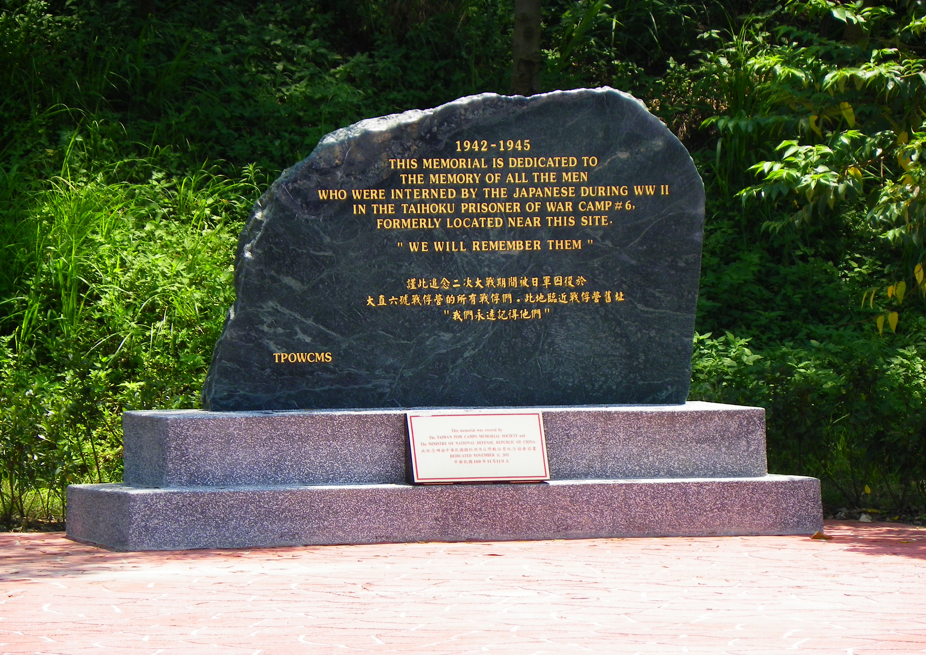 臺北市中山區大直北安路三軍大學故址（國防部新大樓營區預定地）西側的大直六號戰俘營紀念碑，民國100年（2011）11月11日立。太平洋戰爭期間，日本於臺灣各地設置16處戰俘營，臺北大直的六號戰俘營，1942年11月14日起收容新加坡攻略戰後投降的550餘名英國與加拿大軍人，至戰後1945年9月6日始獲釋，其間約50餘人死亡。